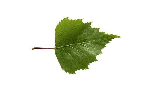 Daun berwarna hijau muda, kecil dan berbentuk segitiga dengan tepi bergigi, yang akan memudar menjadi kuning saat musim gugur tiba.